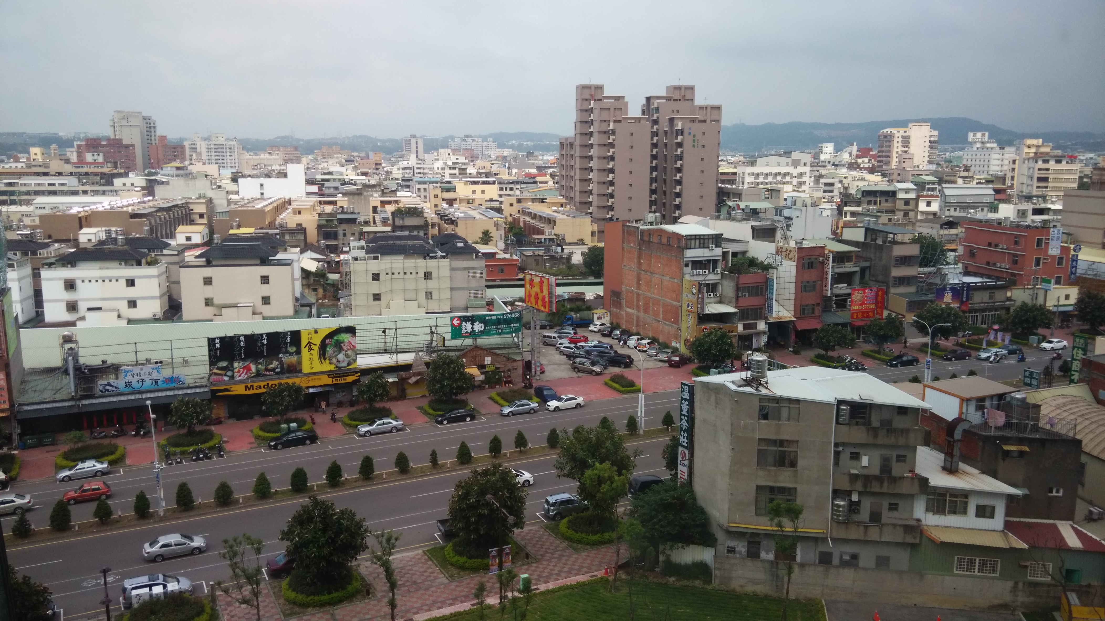 中文（台灣）: 頭份鎮一景